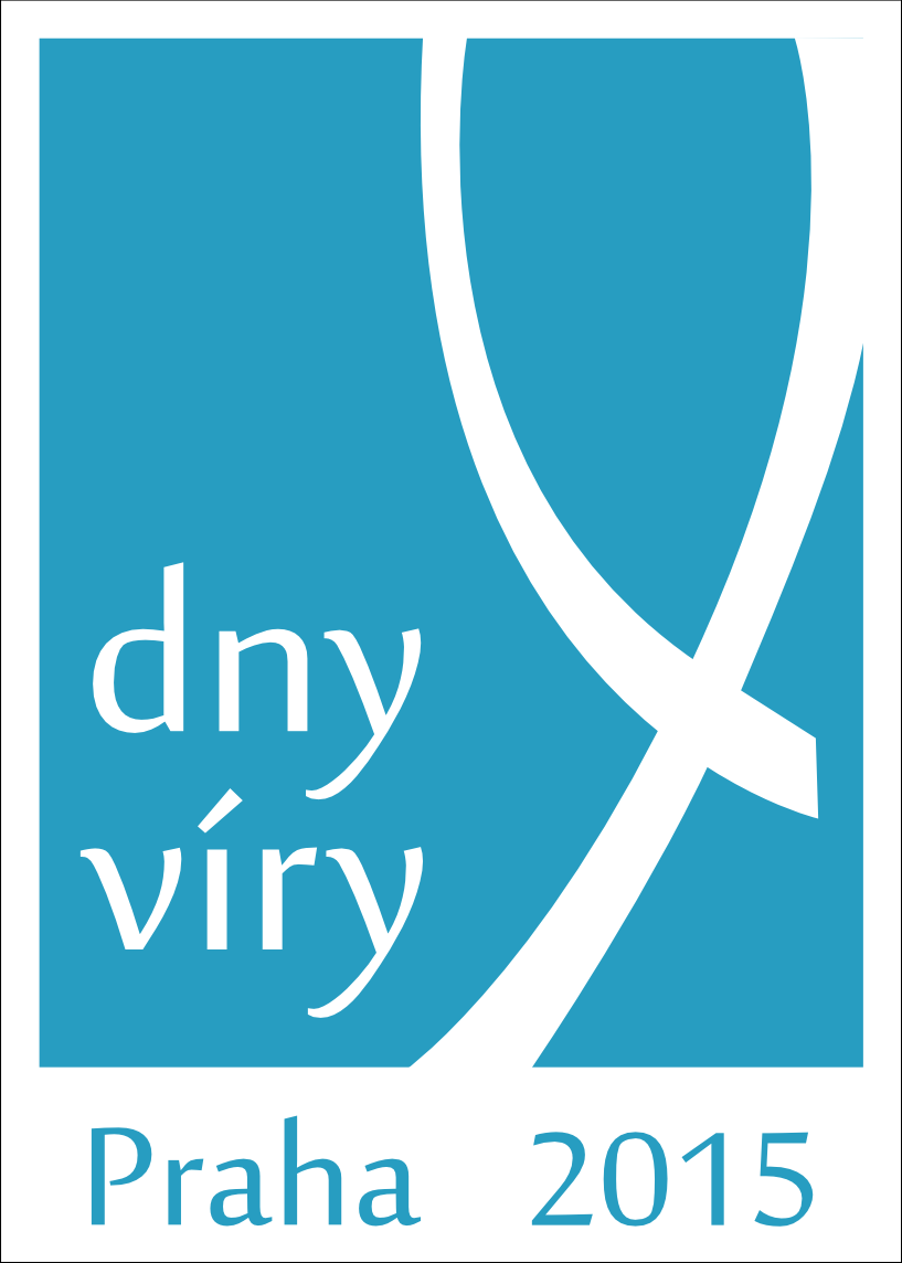 Logo Dnů víry, které proběhnou v červnu roku 2015